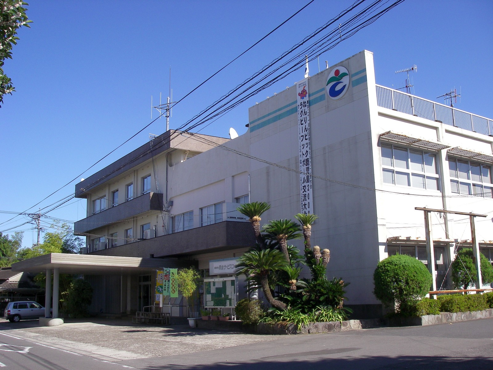 さつま町役場庁舎